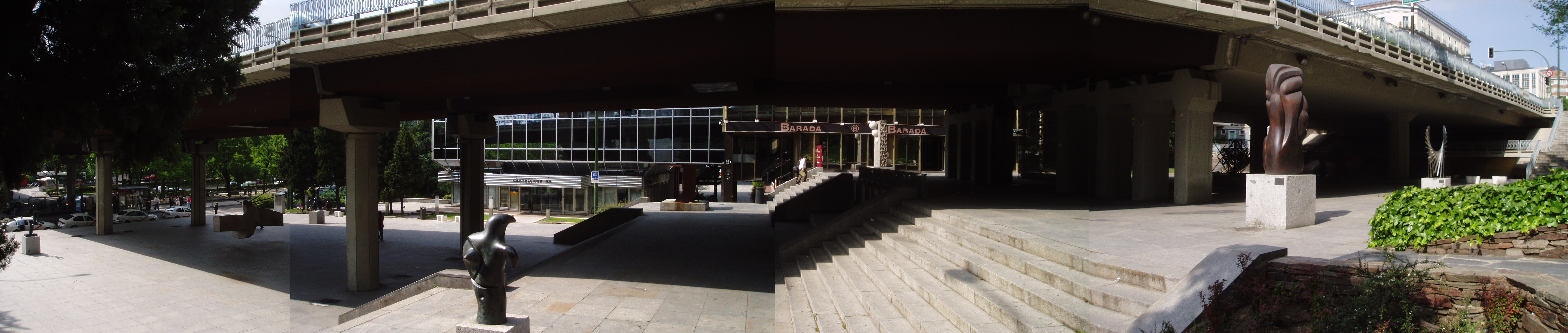 Museo Arte Público (antiguo Museo de Escultura al Aire Libre de la Castellana), en Madrid, España (panorámica)